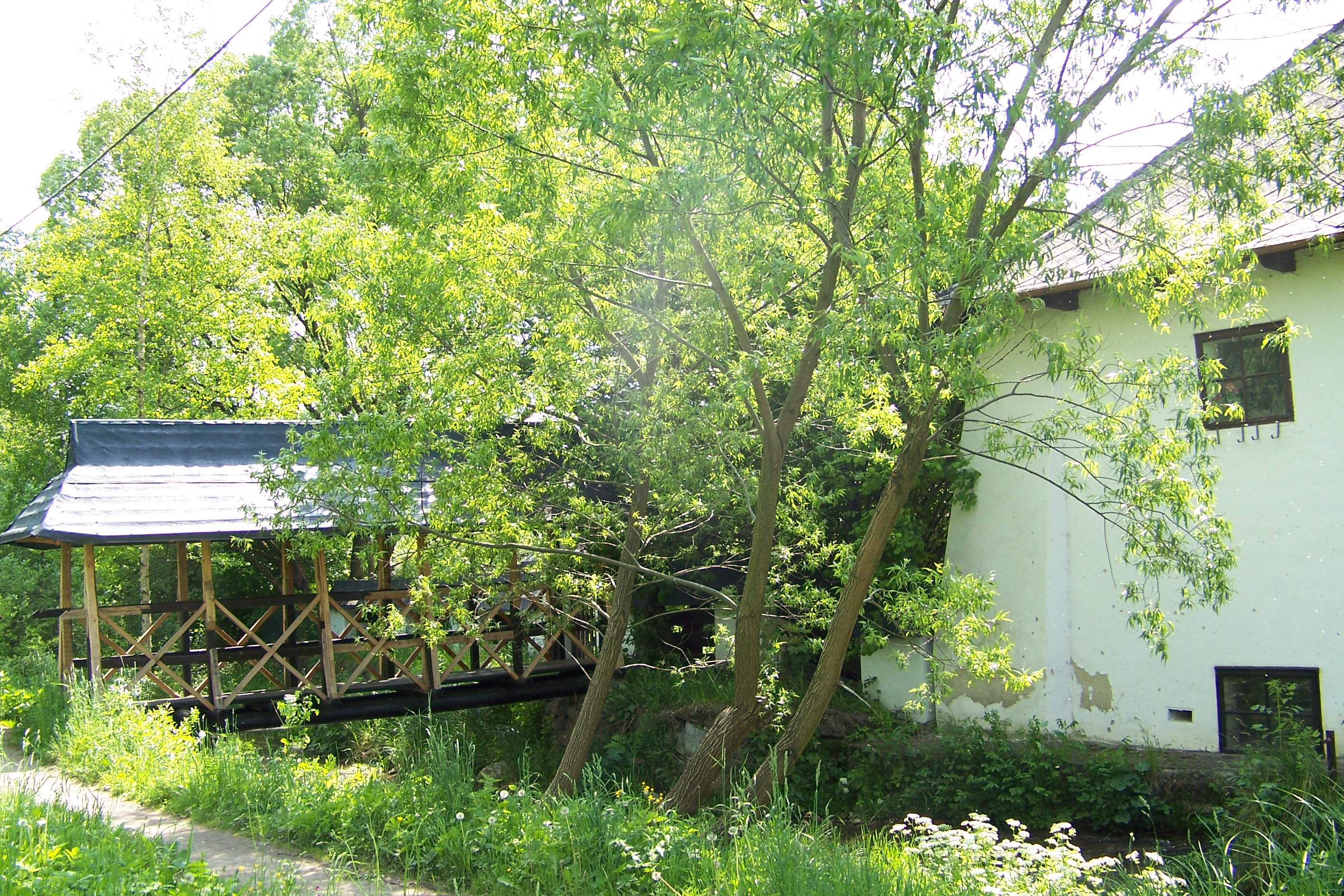 Likavský mlyn